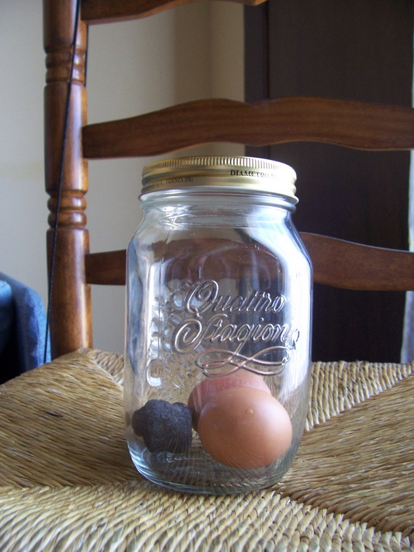 Œufs et truffe